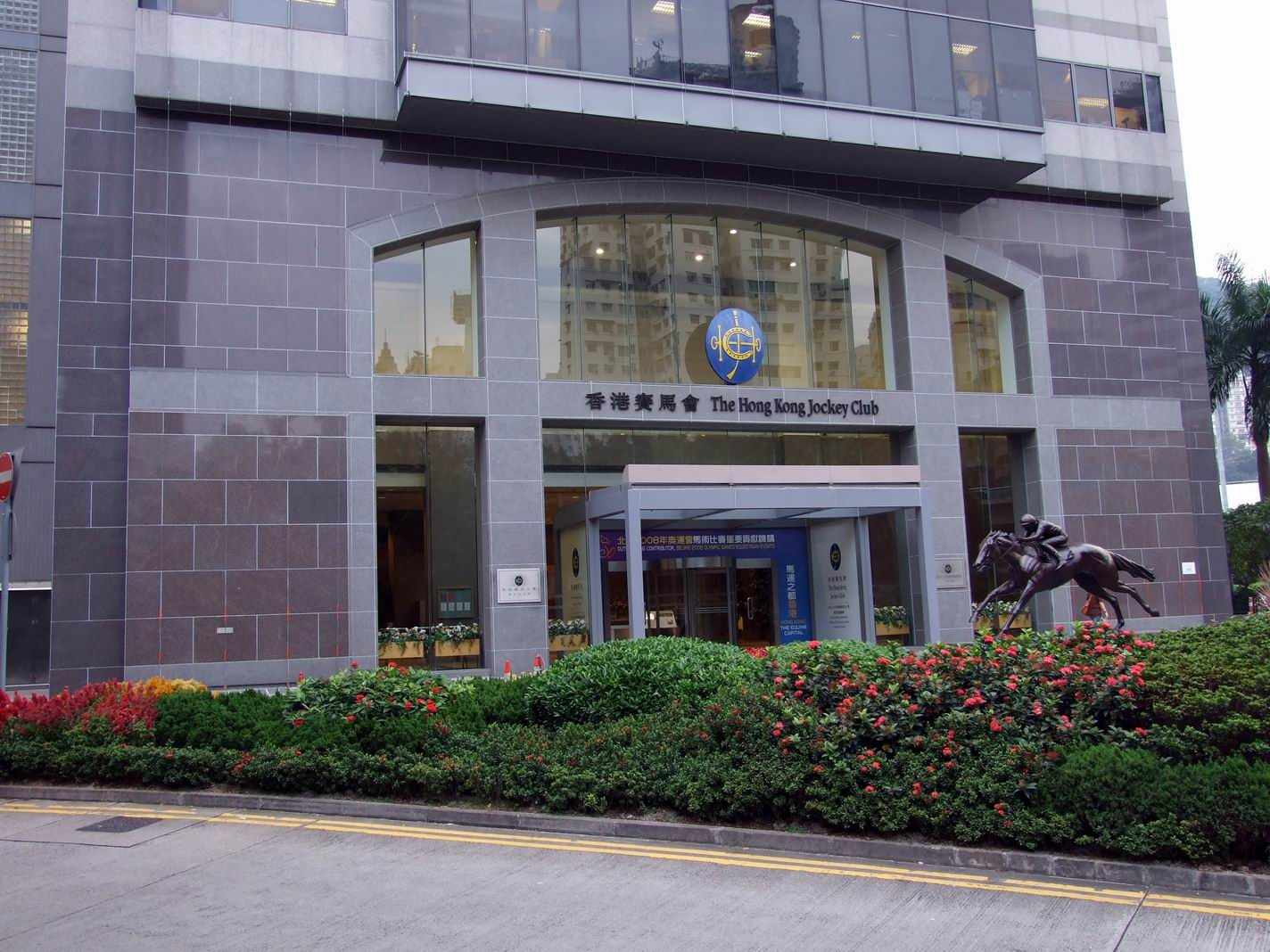 跑馬地馬會大廈